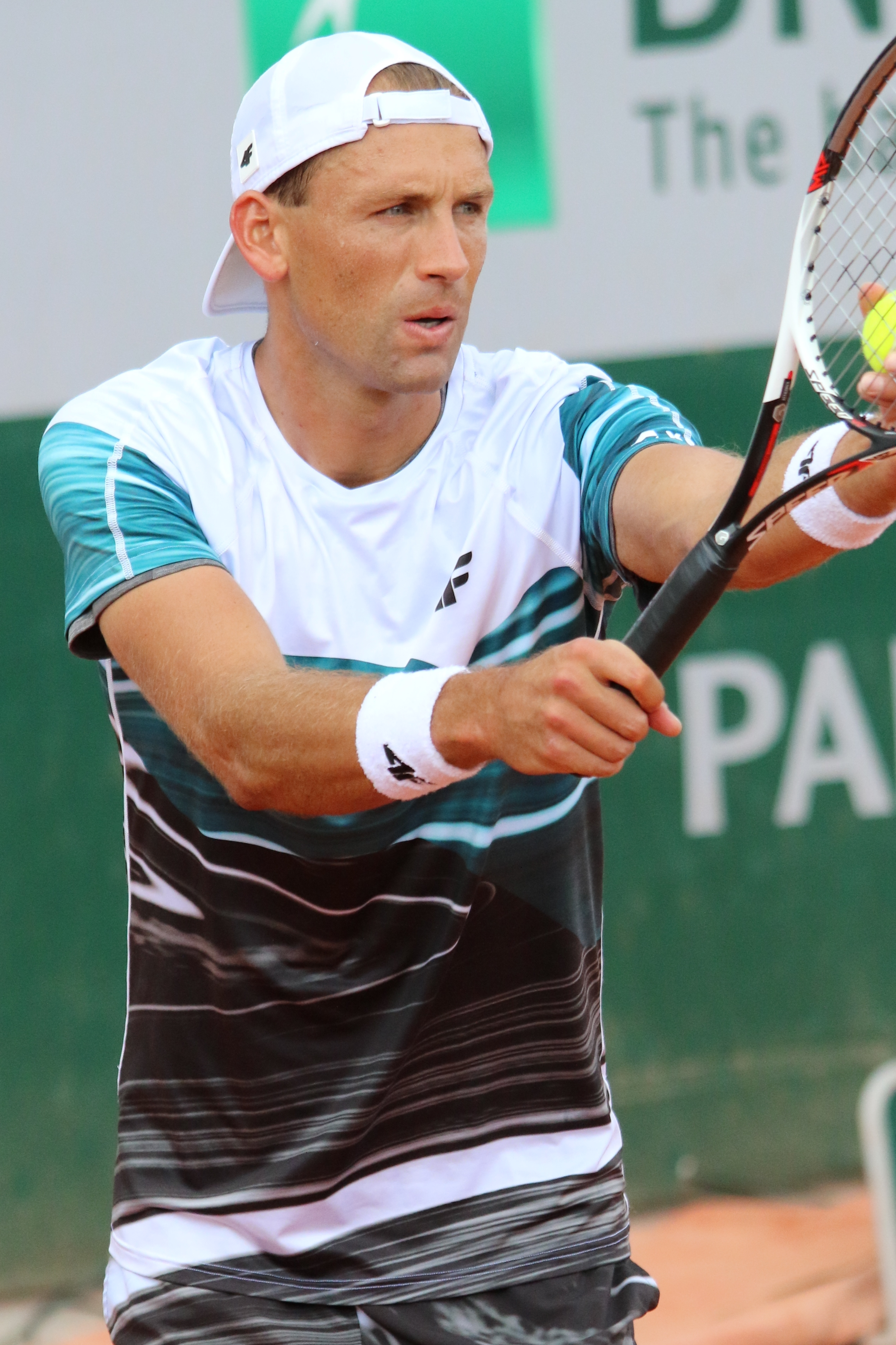 Kubot RG18 (4)